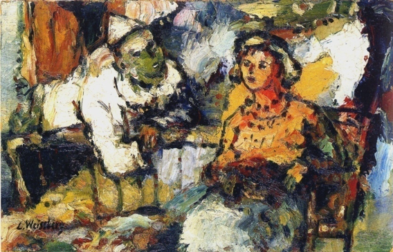 Tableau Clown et jeune fille au balcon, de Léon Weissberg